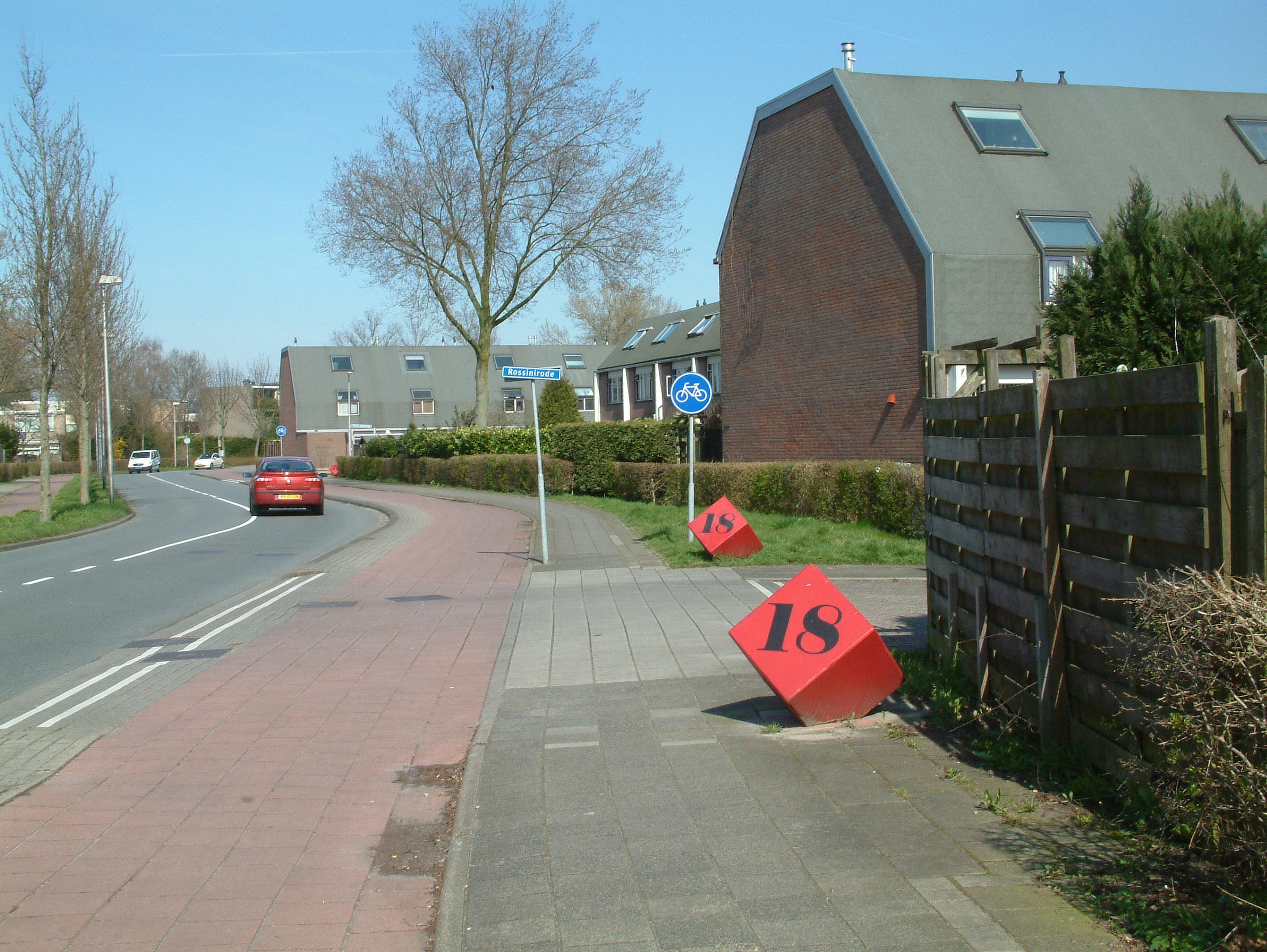 Toegepaste kunst in de wijk Buytenweg in Zoetermeer. De inritten van de woonerven vanaf de door de wijk lopende rondweg zijn genummerd